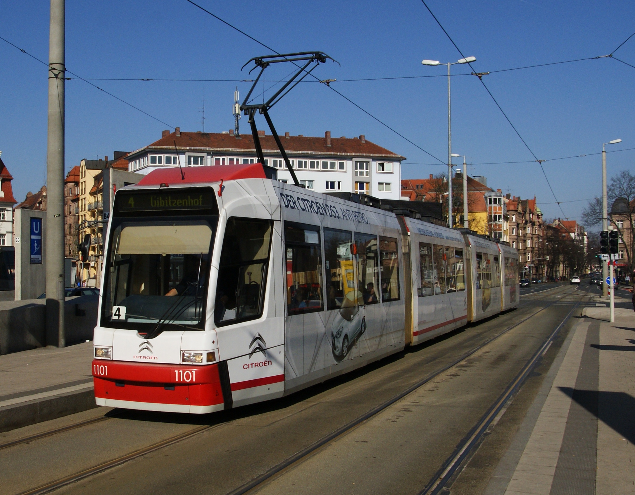 Nürnberger Straßenbahn GT8N Friedrich-Ebert-Platz